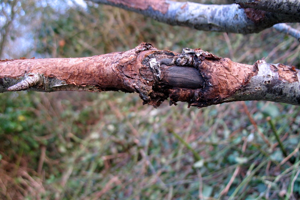 Chancre nectrien (Nectria galligena) sur pommier